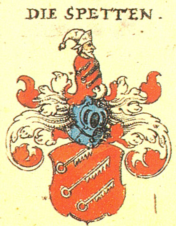 Ritterschaft und Adel in Schwaben Die Spetten